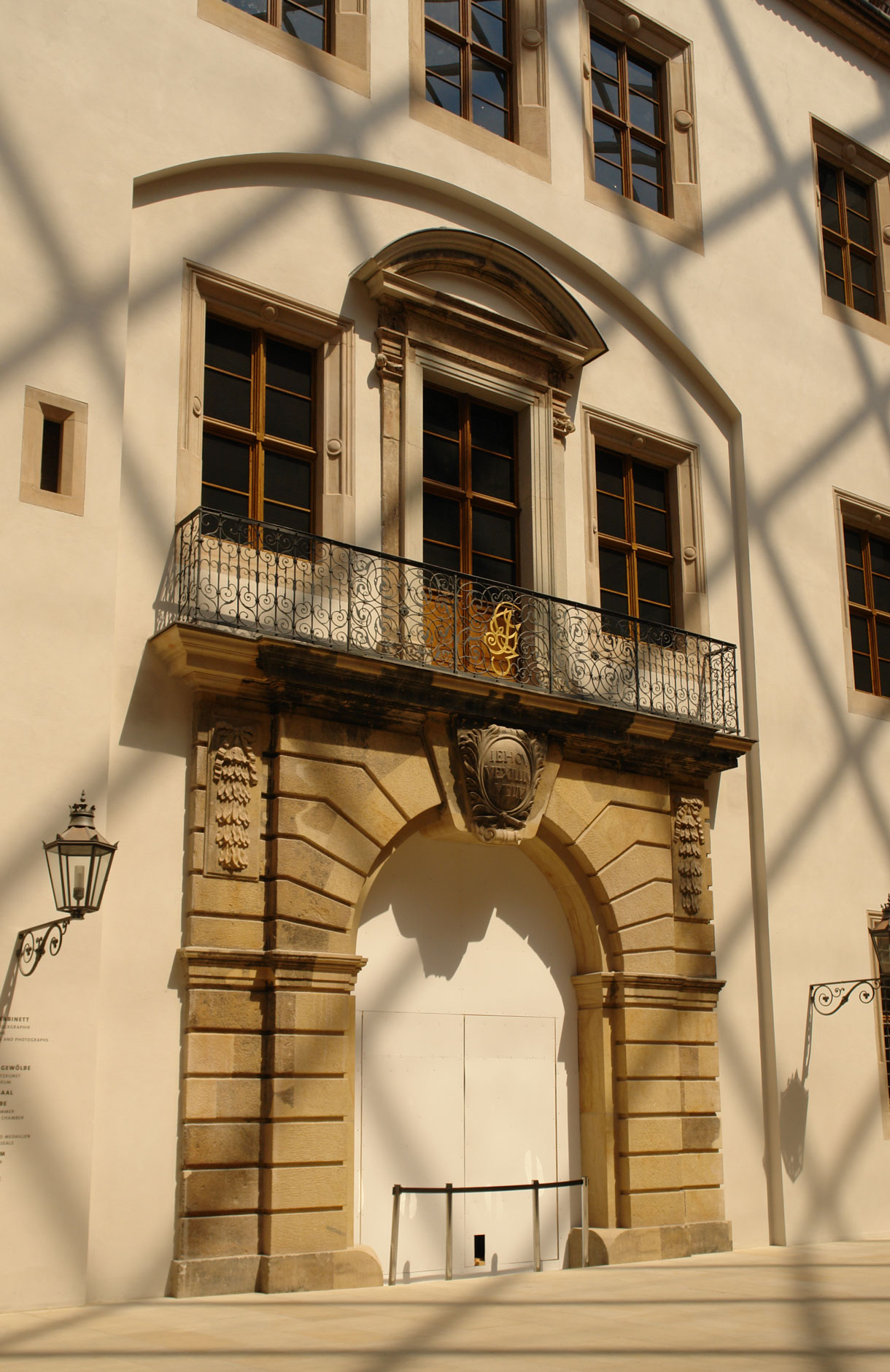 Portal im Kleinen Schlosshof des Residenzschlosses